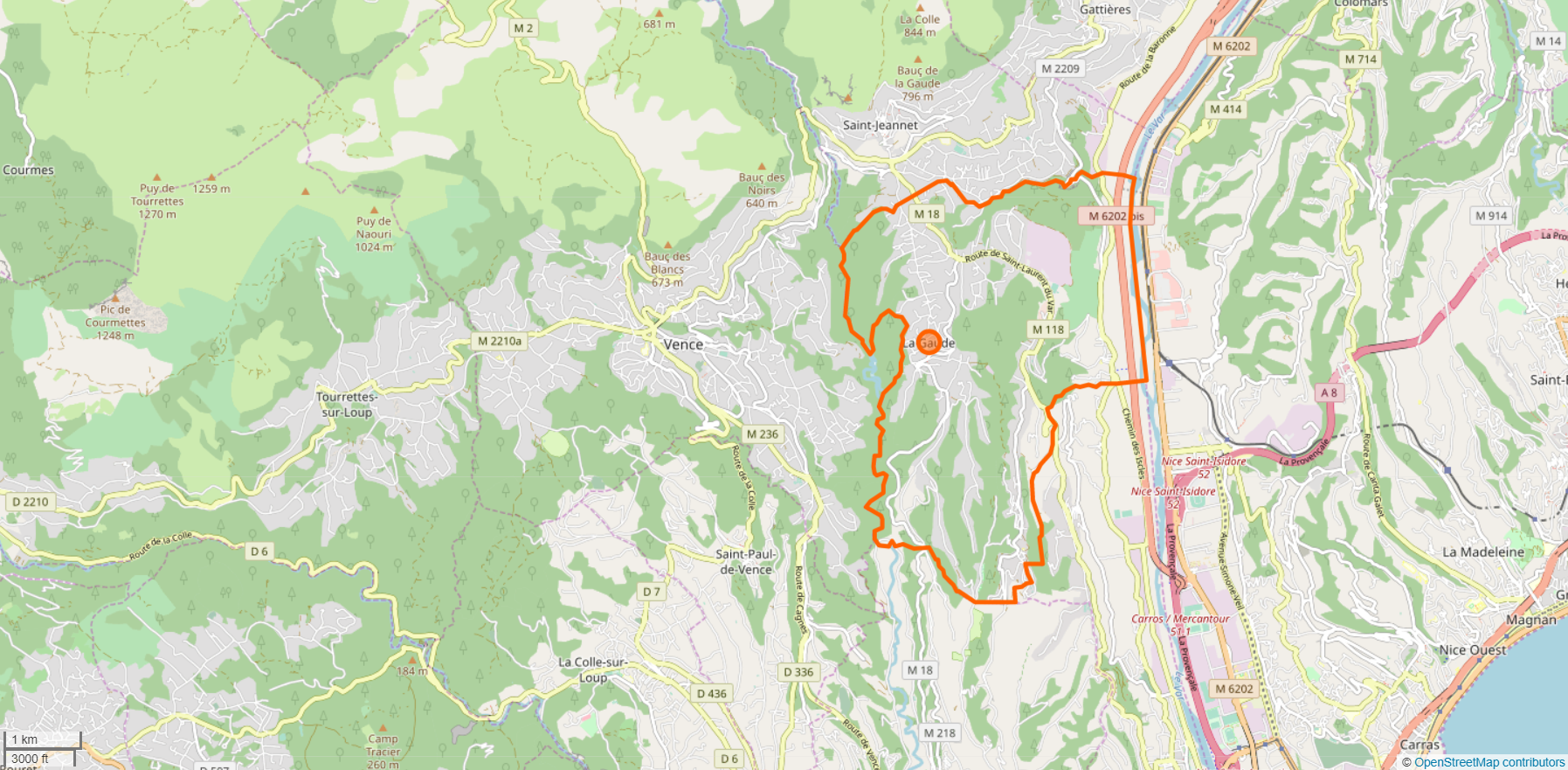 Limite du village de La Gaude (06610) vu sur OpenStreetMap This map may be incomplete, and may contain errors. Don't rely solely on it for navigation.